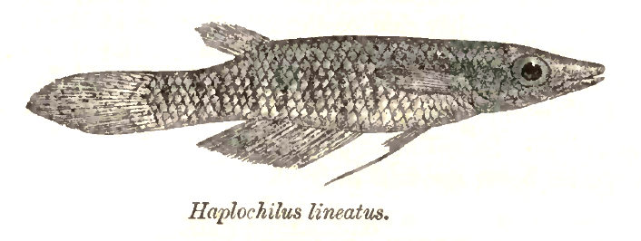 Haplocheilus lineatus = Aplocheilus lineatus (Valenciennes, 1846)